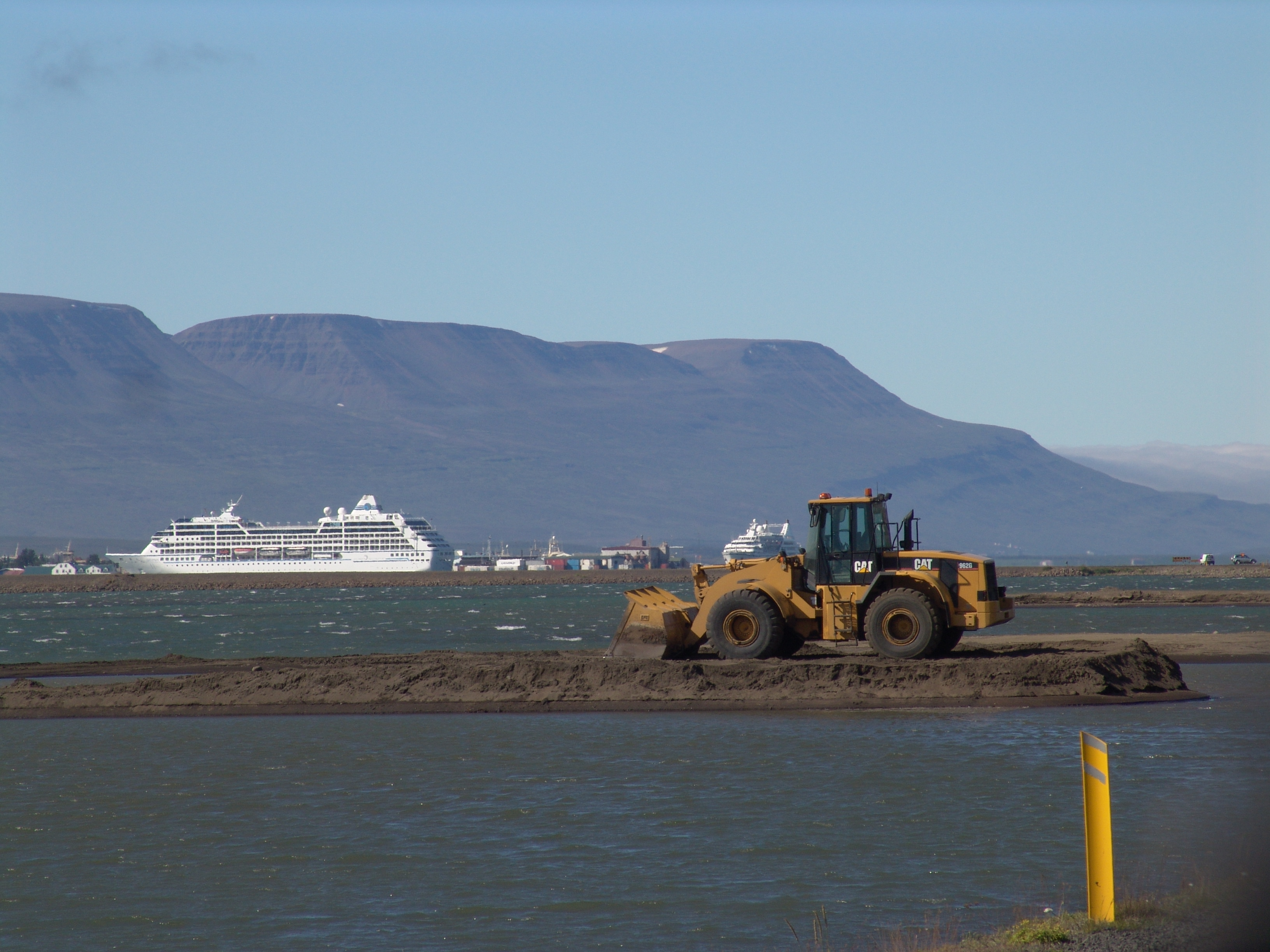 Island, Akureyri.